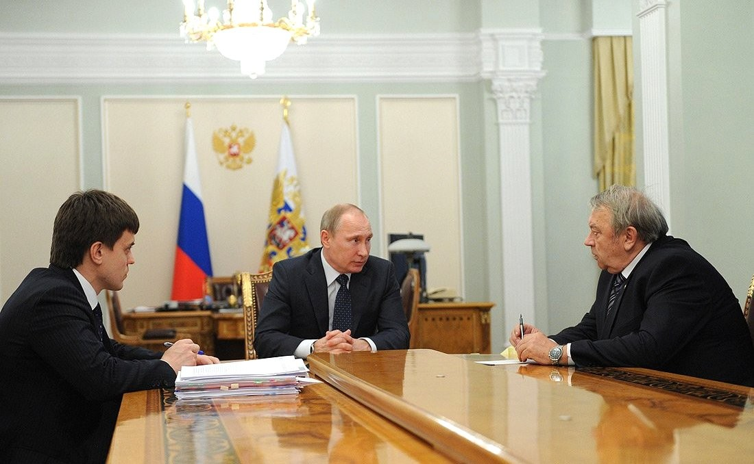 Встреча Владимира Путина с президентом РАН Владимиром Фортовым и руководителем ФАНО Михаилом Котюковым